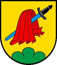 Wappen von Martisberg Kanton Wallis Schweiz